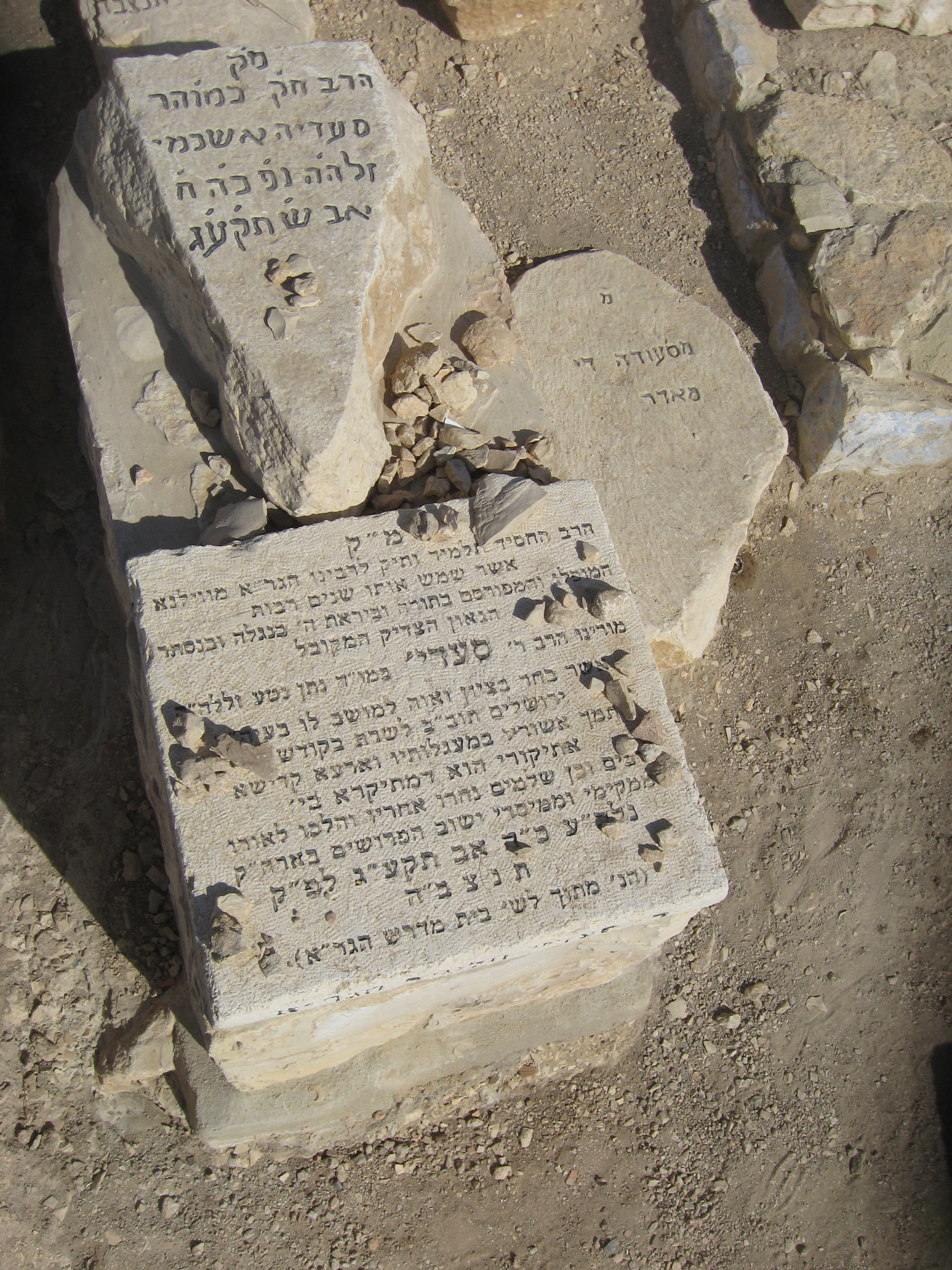 קבר ר' סעדיה משקלוב